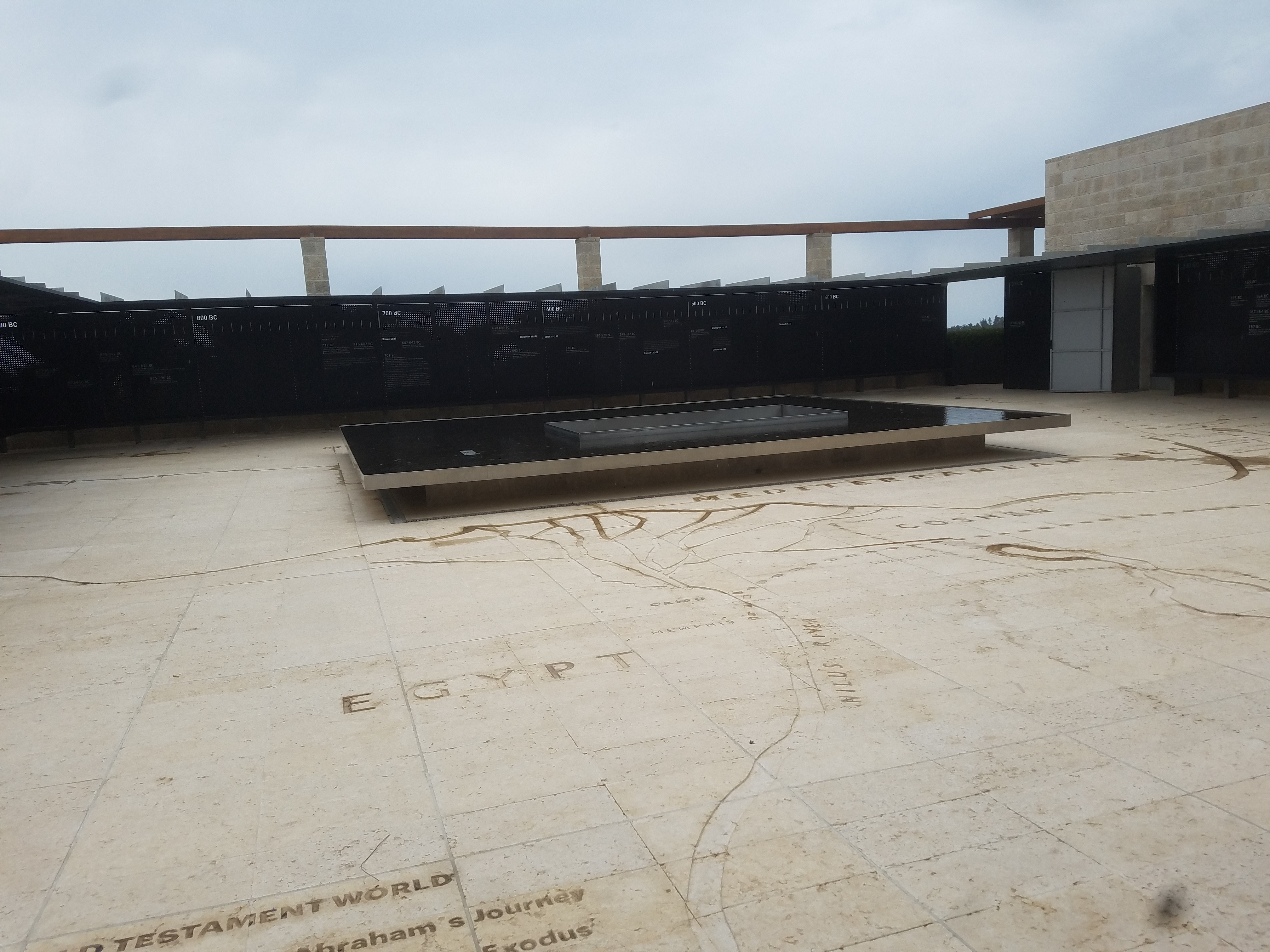 חצר הכניסה לסאקסום